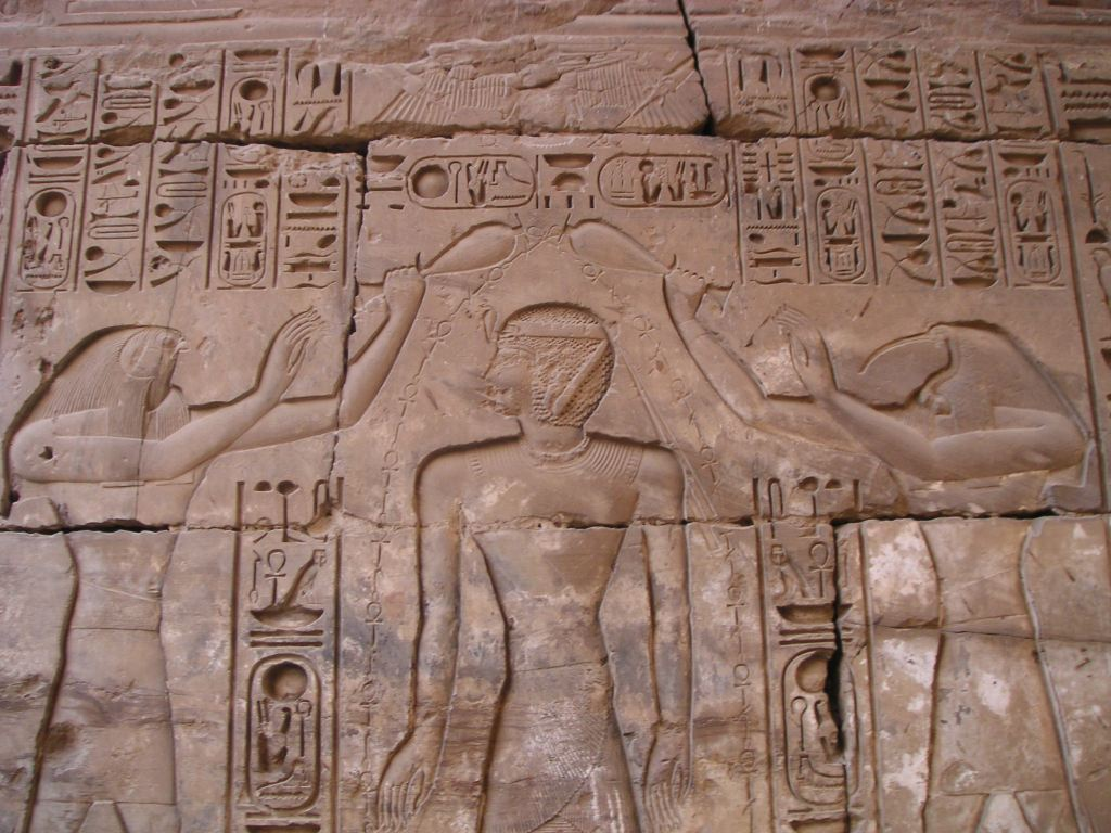 Relief du temple de Khonsou à Karnak - Scène du couronnement de Ramsès IV - XXe dynastie égyptienne